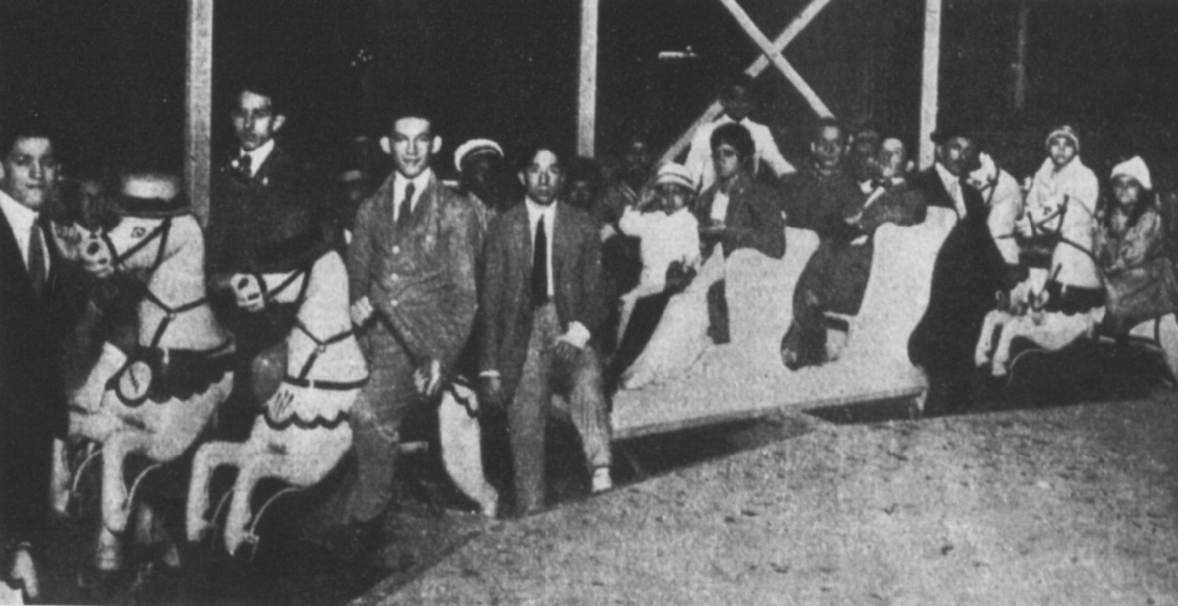 Carrossel na festa de comemoração dos cem anos da cidade de Niterói, de propriedade do pioneiro do cinema no Brasil, Paschoal Segreto (1868-1920).